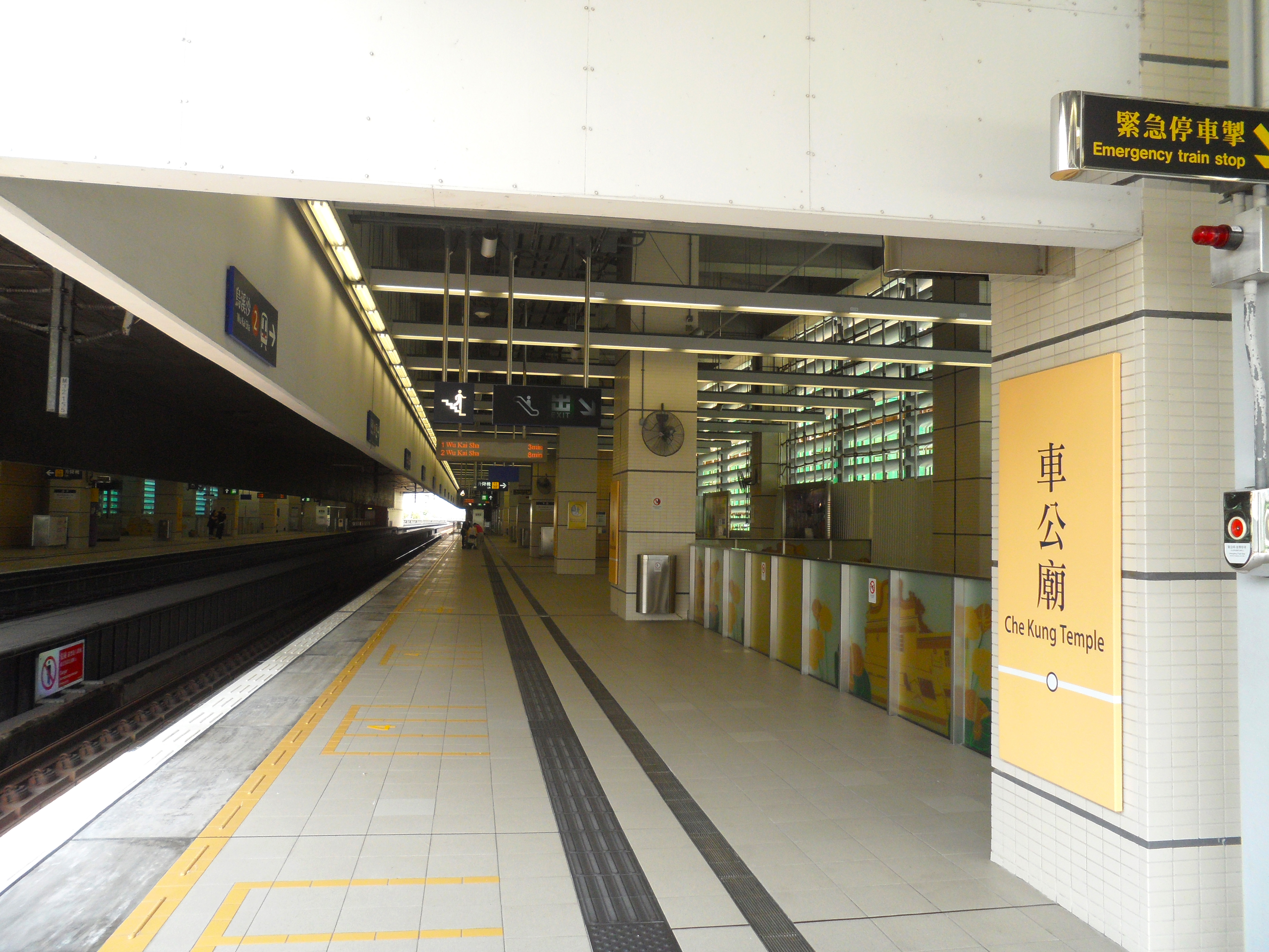 港鐵車公廟站二號月台